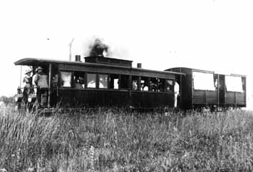 Tåg på Visby - Visborgs slätts Järnväg sommaren 1912.